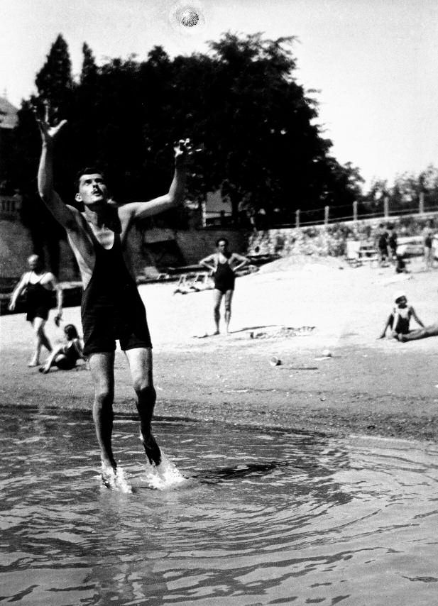 Selbstportrait des ungarischen Fotografen Imre Kinszki